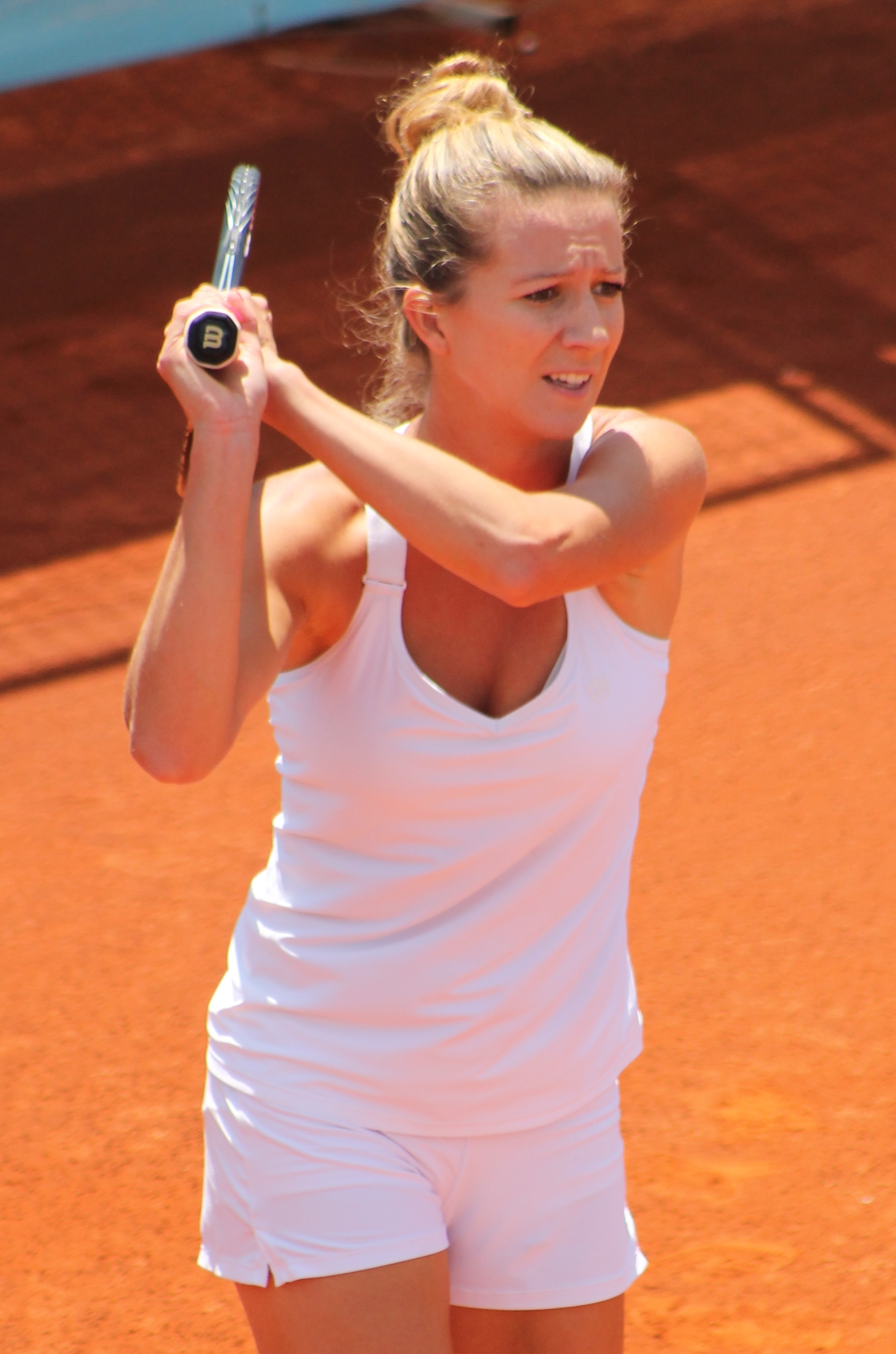 Domachowska MA14 (6)